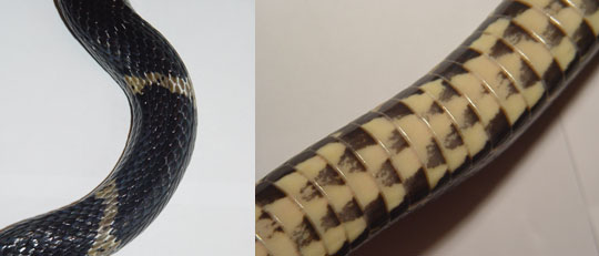 Schrenki aanzichten